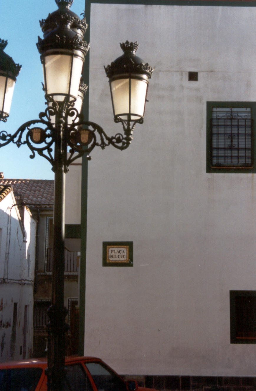 La plaza del Cuc (gusano) en Catadau (Valencia). Autor: Fev. Fecha julio 2002